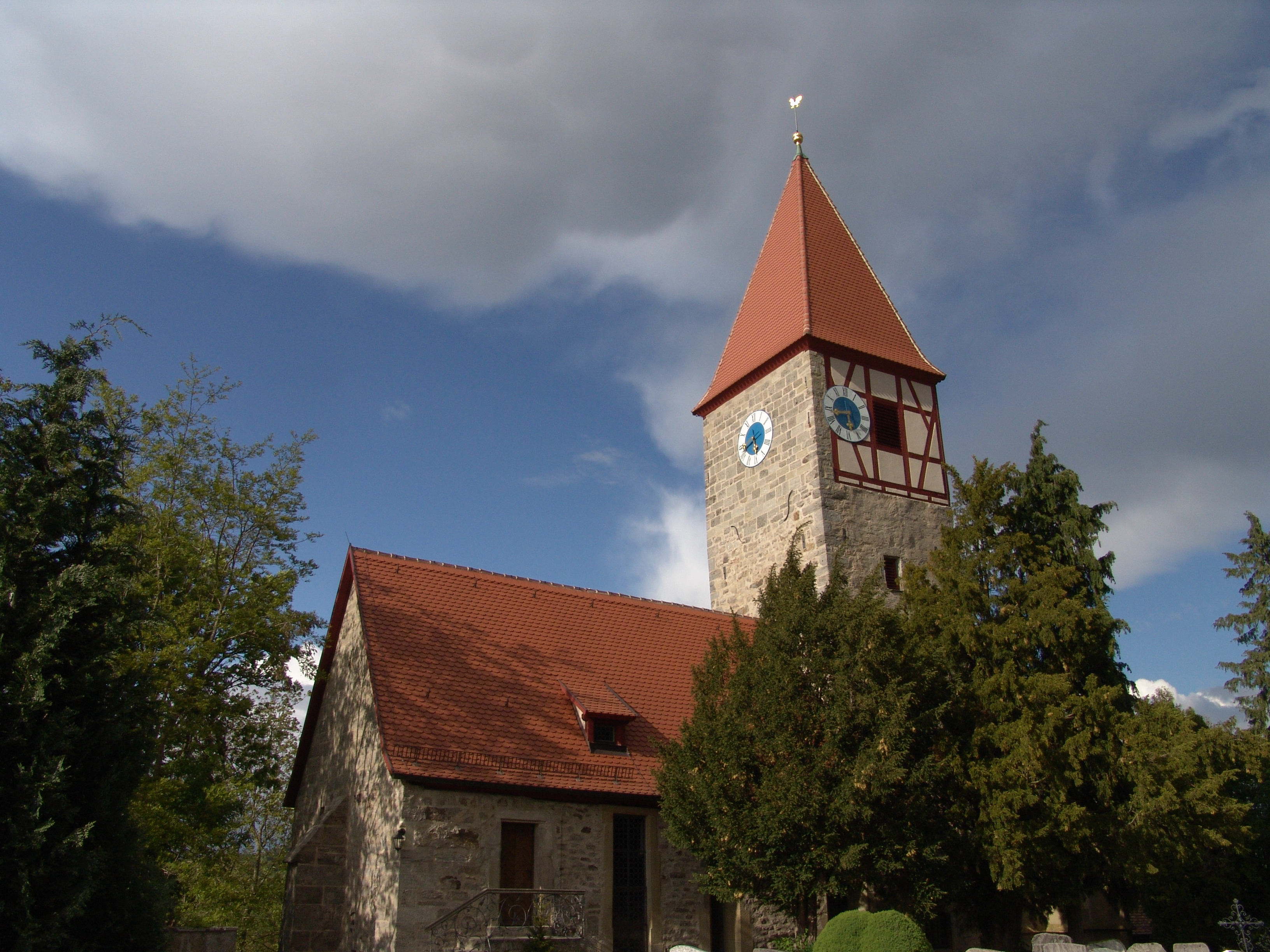 evang.-luth Kirche Heilig Kreuz in Neusitz